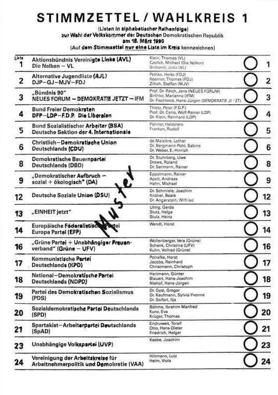 ADN-ZB Repro 12.3.90 / Berlin: Stimmzettel für den Wahlkreis I (Berlin) zur Wahl der Volkskammer der DDR am 18. März 1990.